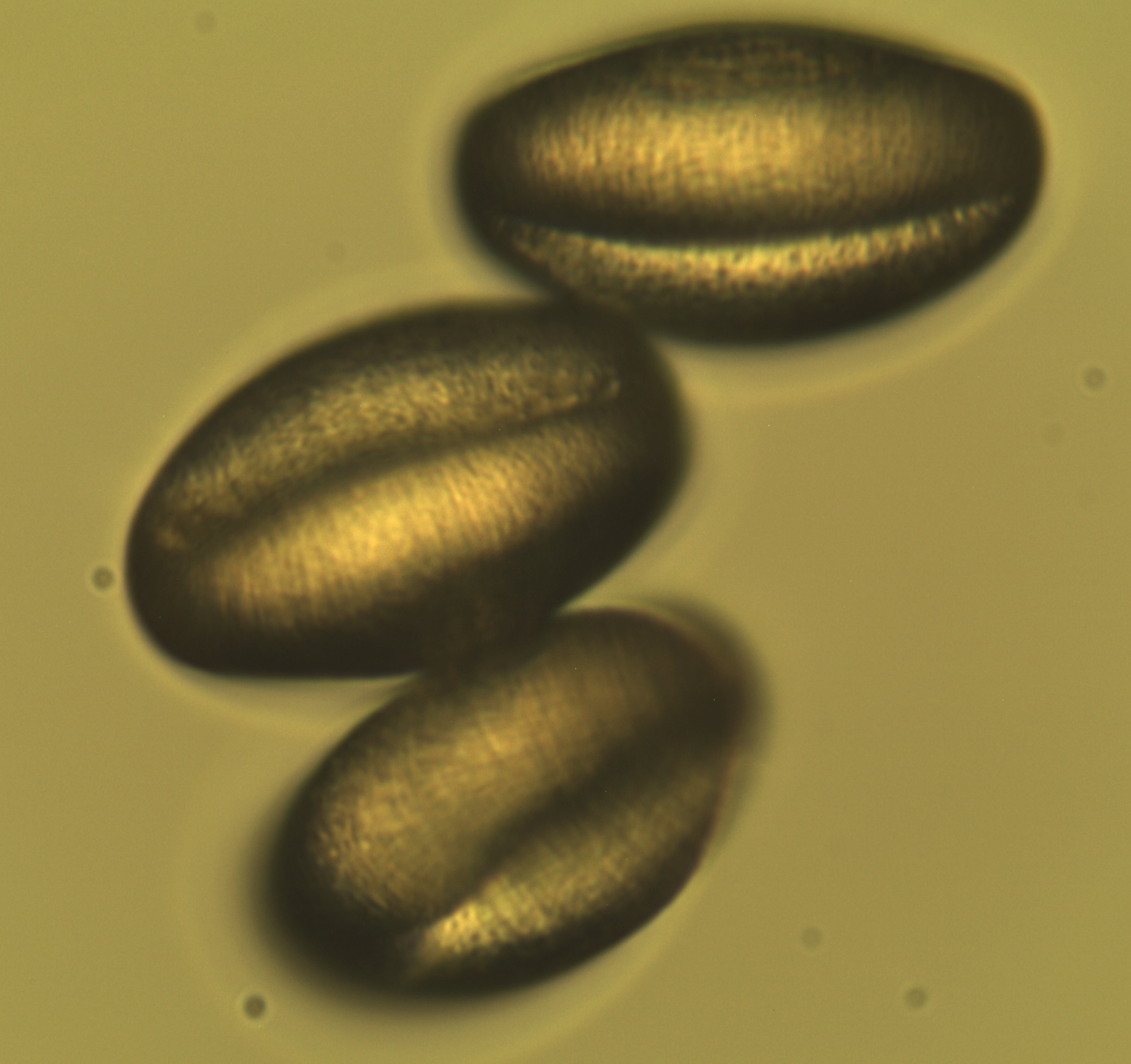 Helleborus niger Pollen 400x